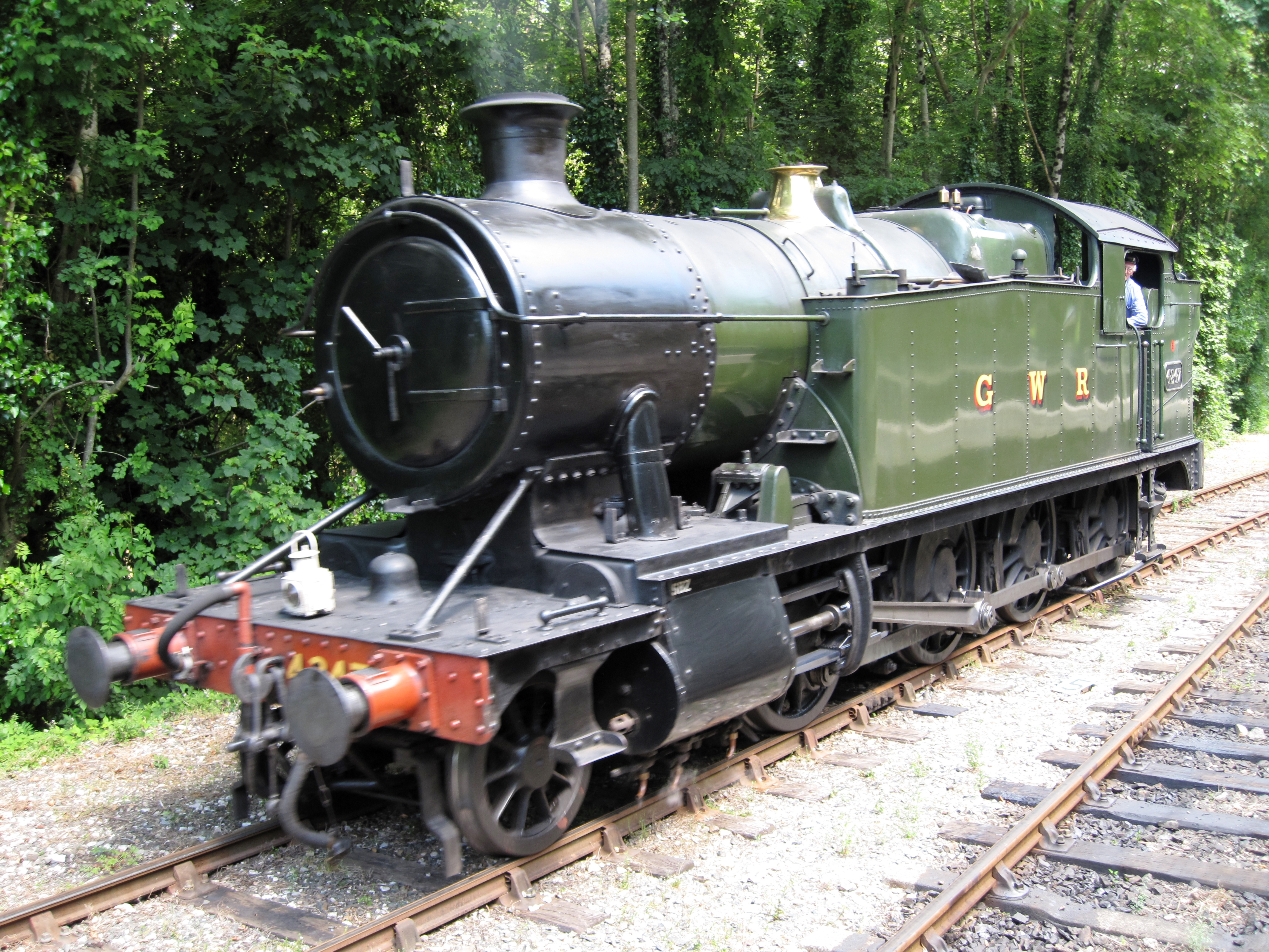 Lokwechsel der Museumsbahn im Bahnhof Bodmin Parkway, Cornwall, Großbritannien